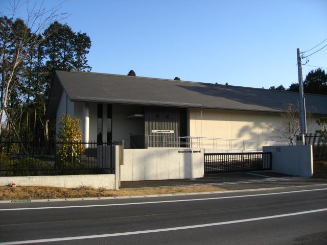 千葉県成田市「日本近代文学館成田分館」遠景を撮影